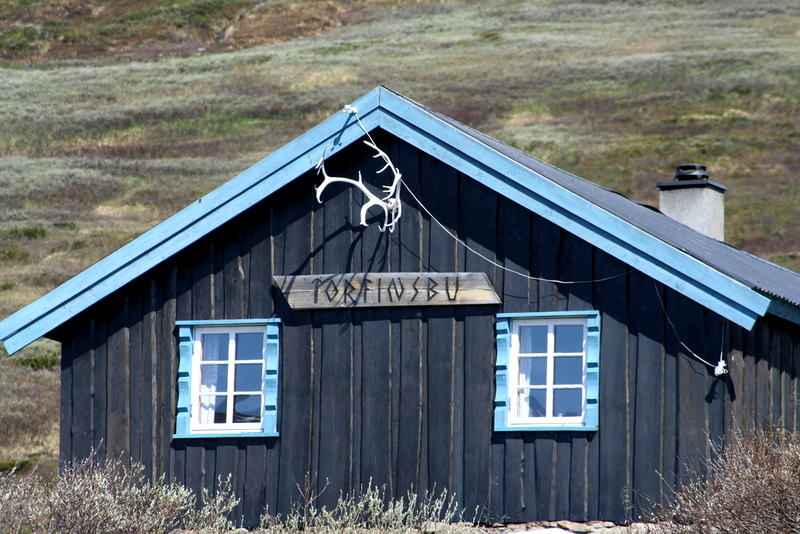 Torfinnsbu